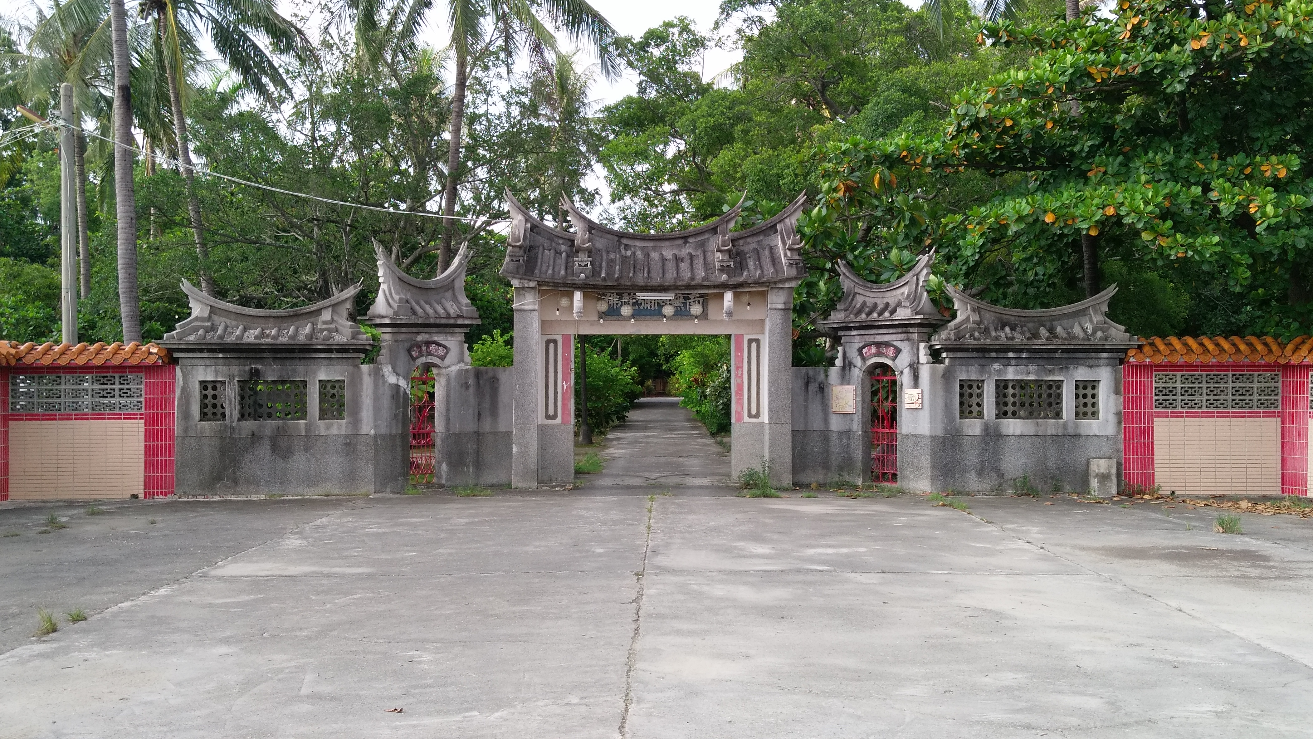 中文（台灣）: 新超峰寺山門